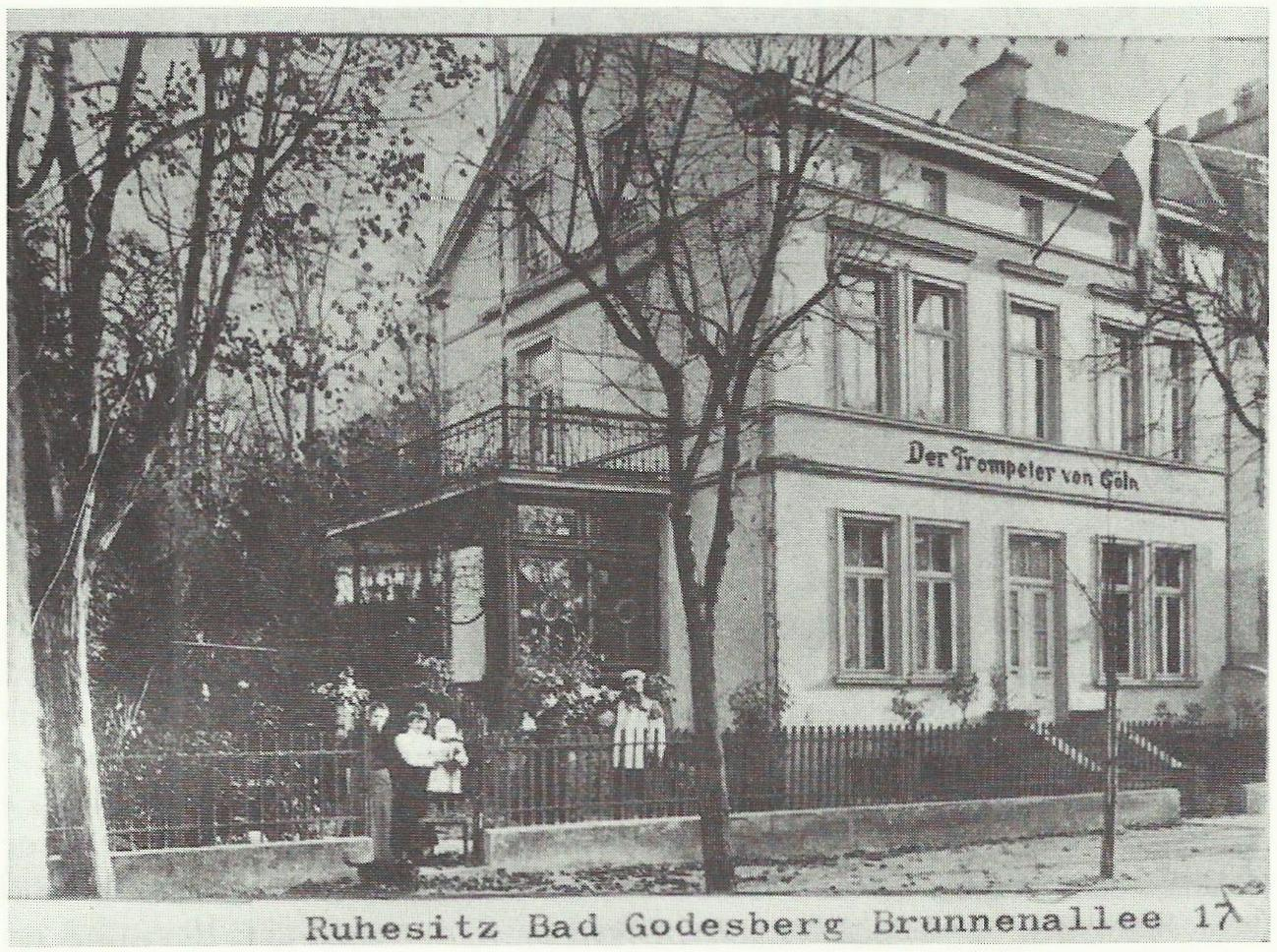 Denkmalgeschützte Villa, Brunnenallee 17, Bonn-Bad Godesberg, Ortsteil Alt-Godesberg: Aufnahme mit Reinhold Fellenberg